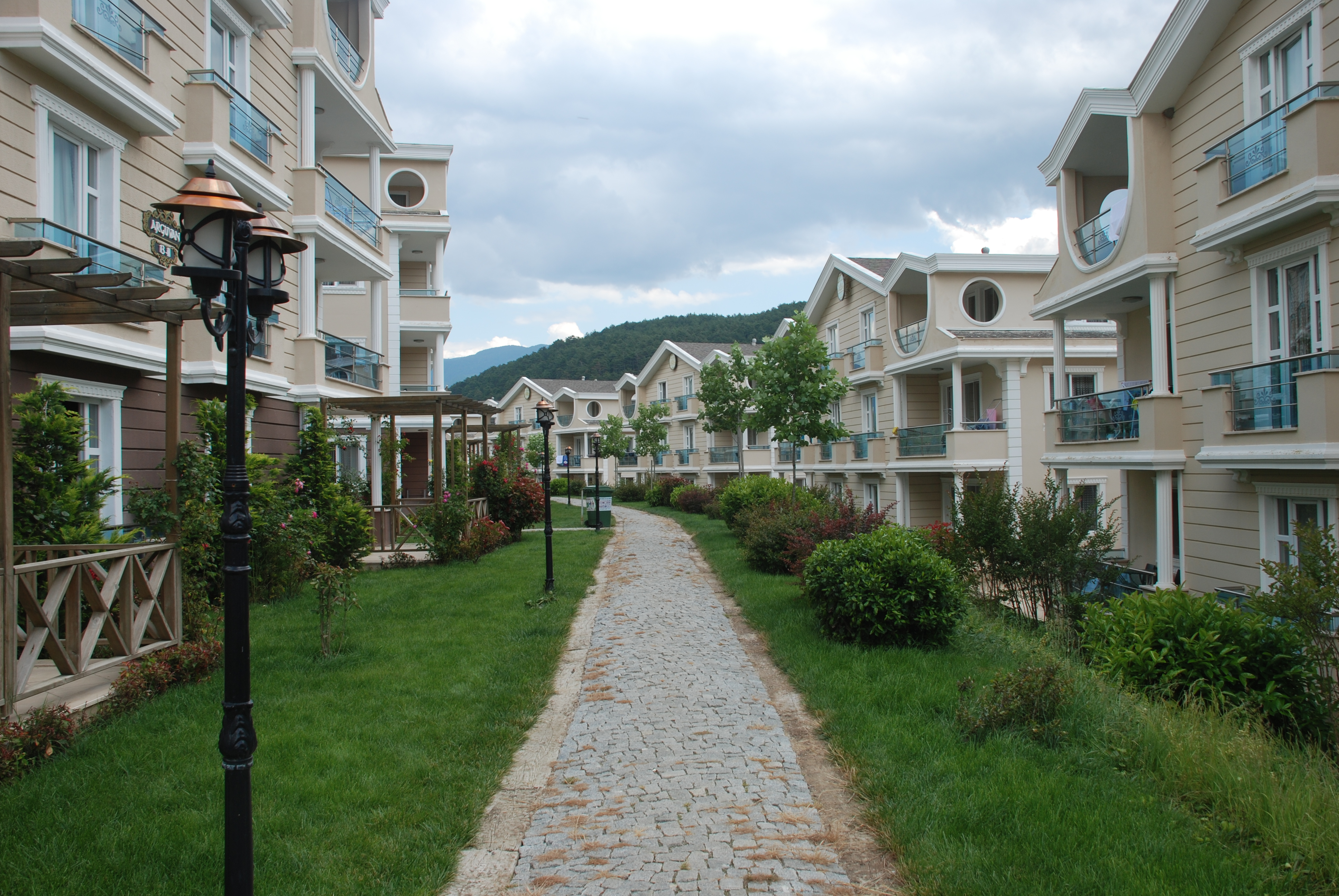 Bolu ili, Mudurnu ilçesi,termal tesisler.